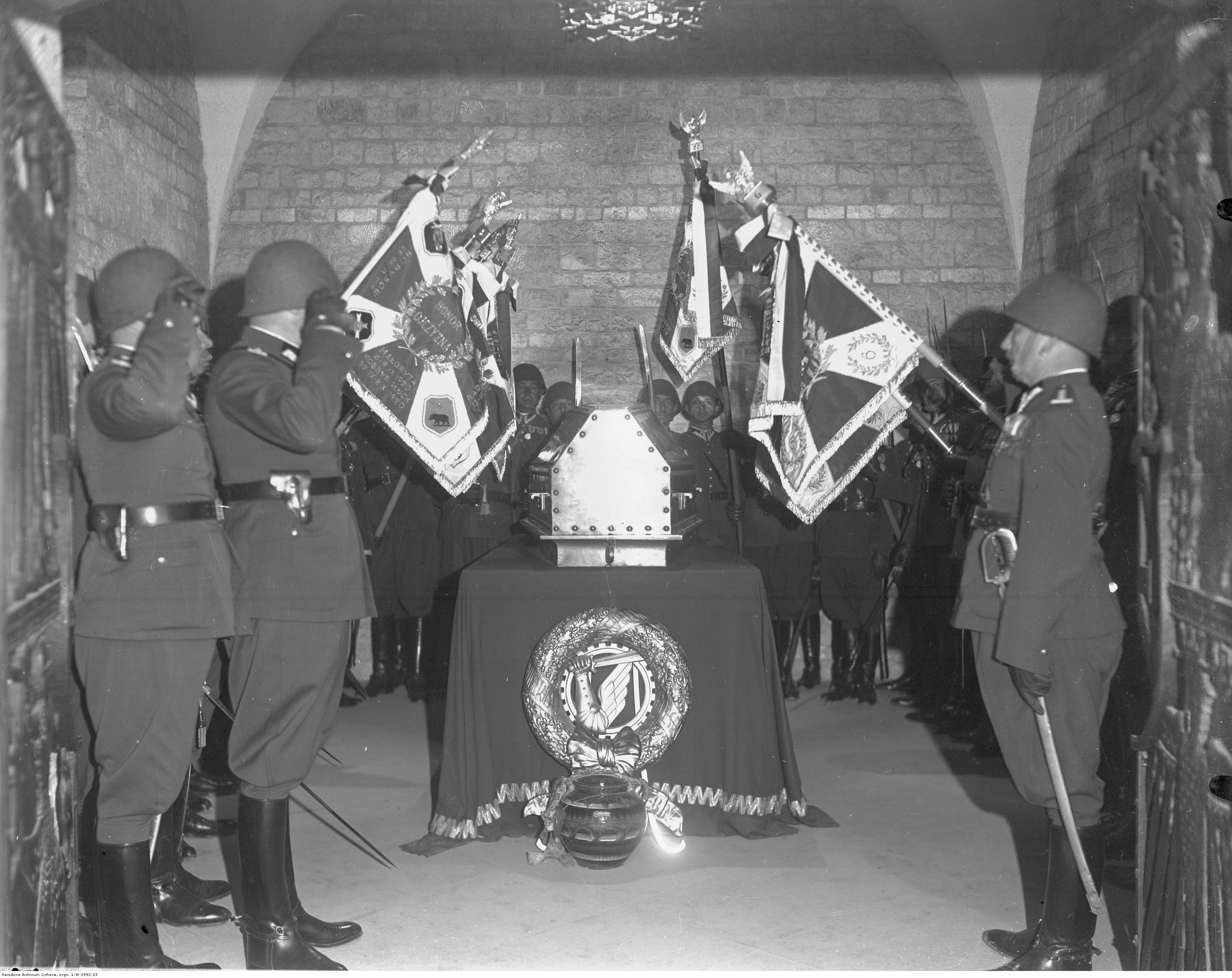 Wręczenie i poświęcenie sztandarów pułkom artylerii na krakowskich Błoniach 29 maja 1938. Poczty sztandarowe oddają hołd marszałkowi Józefowi Piłsudskiemu w jego krypcie na Wawelu.Koncern Ilustrowany Kurier Codzienny - Archiwum Ilustracji. Sygnatura: 1-W-2992-23